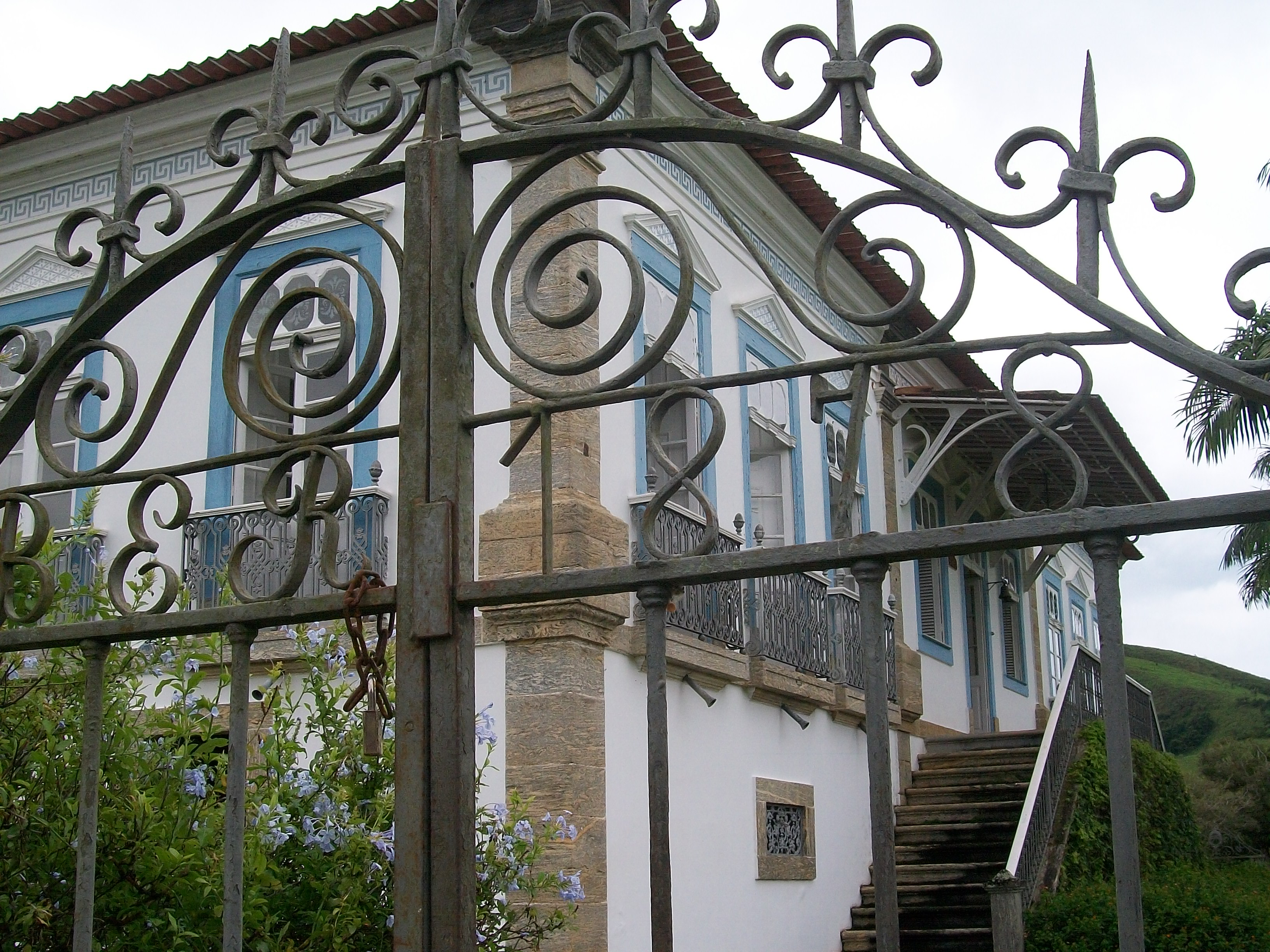 Fazenda São Lourenço